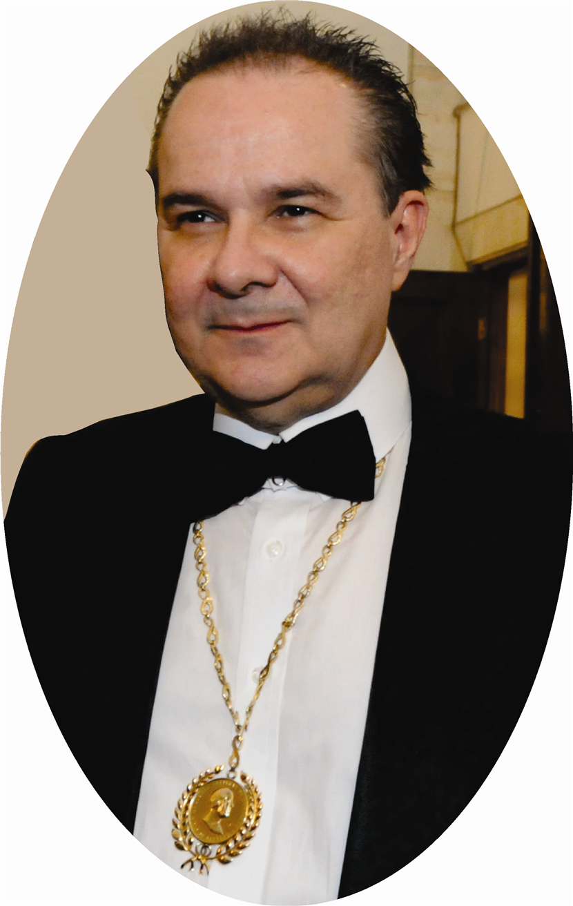 Foto do Prof. Dr. Francisco José Barcellos Sampaio